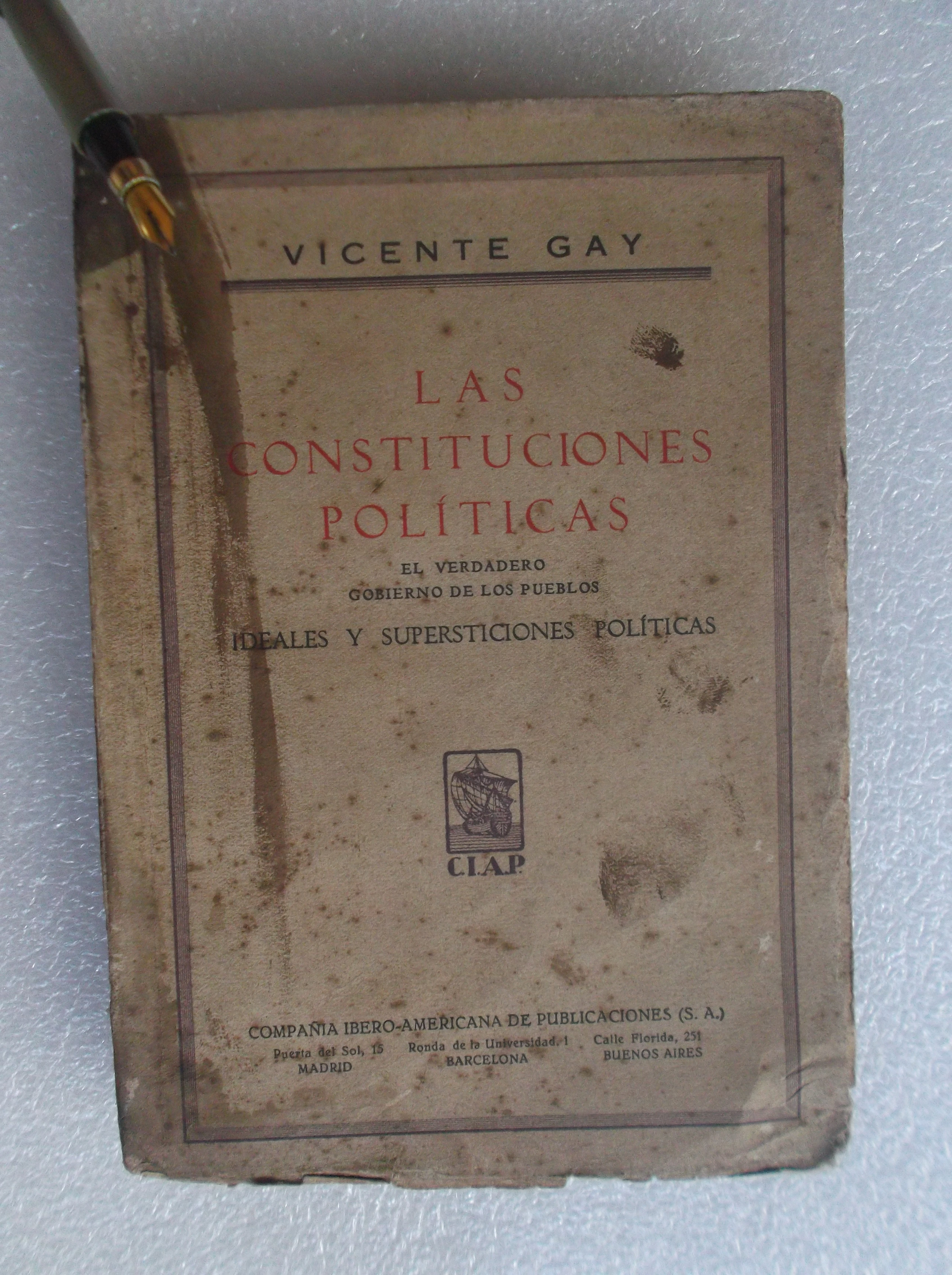 libro/livro de VICENTE GAY (Vicente Gay y Forner), Las Constituciones Políticas - El verdadero gobierno de los pueblos, de 1929. Pertecente a coleção da autoria desta imagem.